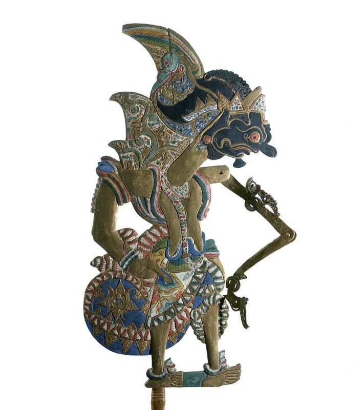 Schaduwfiguur. Houten wajangpop Unknown language: Wayang krucil Wayang klitik Suyudana